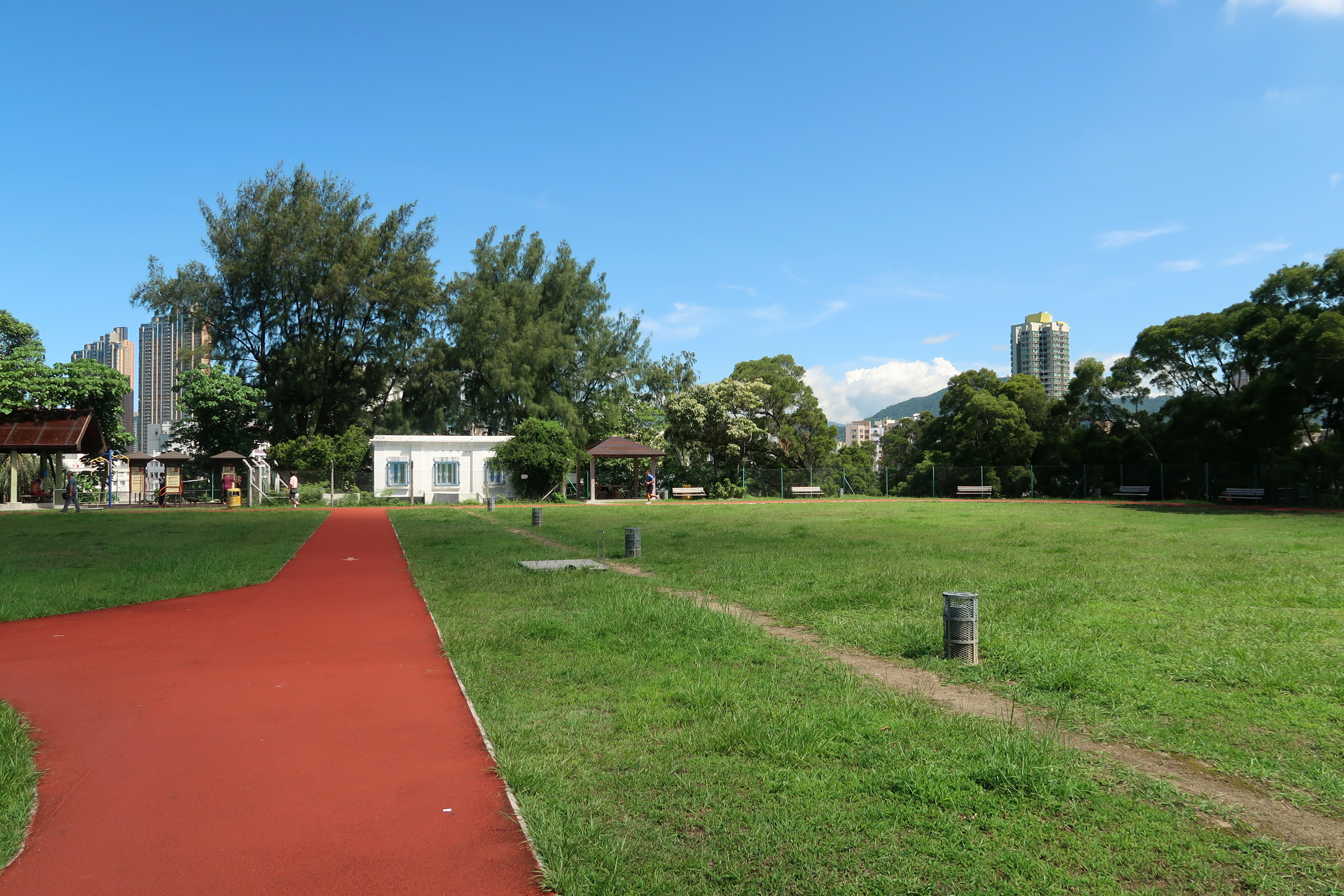 Yau Ma Tei Service Reservoir Rest Garden